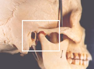 La ATM es la articulación que hace posible abrir y cerrar la boca. Es la articulación dónde la mandíbula se articula con el hueso temporal del cráneo, delante del oído y en cada lado de la cabeza. Se utiliza al masticar, hablar, tragar, bostezar, etc. Por ello, es una de las articulaciones más usadas en el cuerpo. Usted puede localizarla poniendo sus dedos delante de cada oído y presionando firmemente al abrir y cerrar la boca: el movimiento que sentirá ocurre en cada ATM. Trabajan siempre juntas y conducidas por cuatro pares de músculos que crean sus movimientos. Cuando las ATM funcionan correctamente, usted puede abrir y cerrar su boca sin dolor ni molestias.